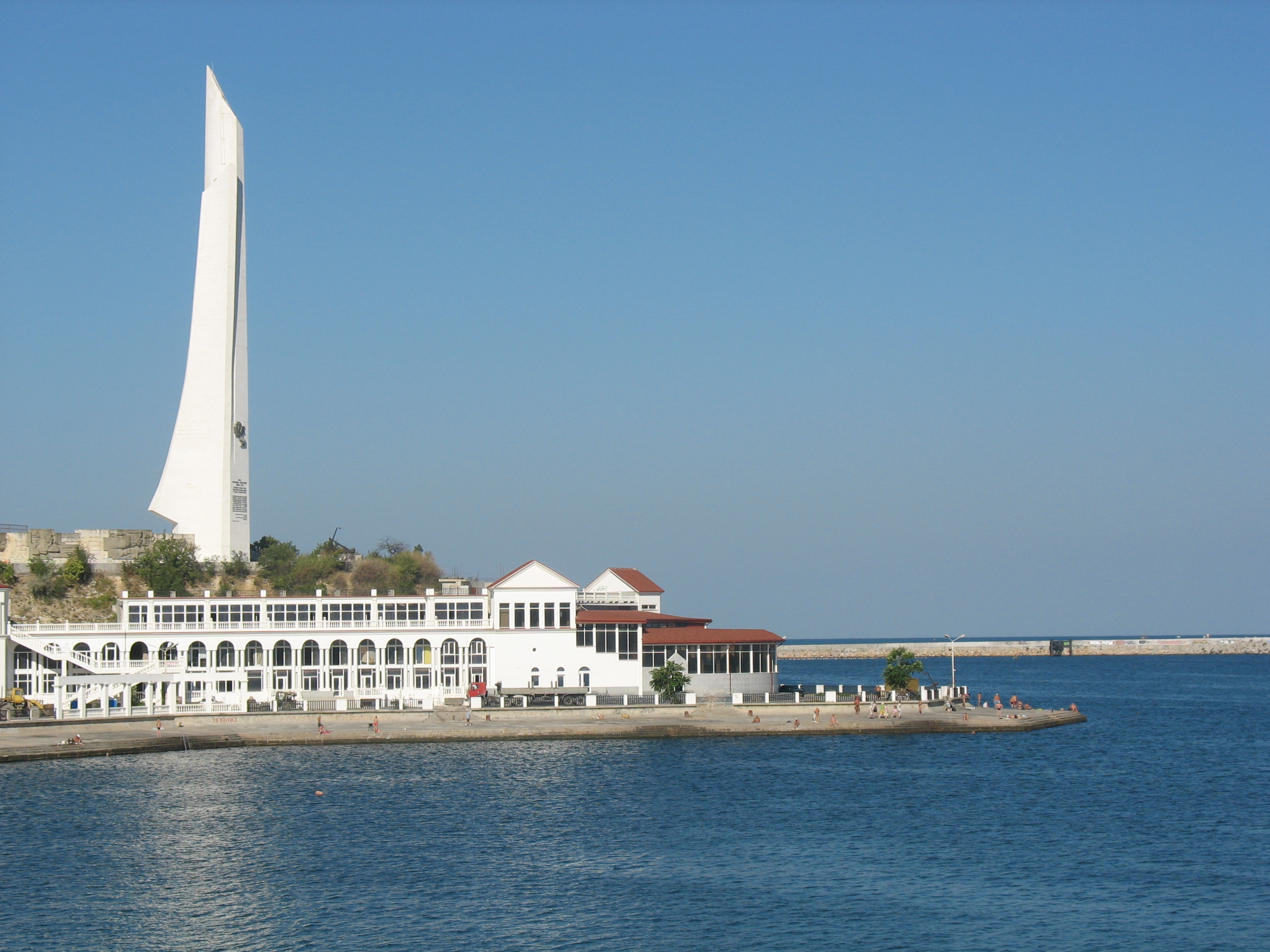 Обелиск в Севастополе 2010.JPG